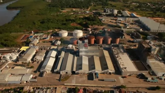 César Iglesias